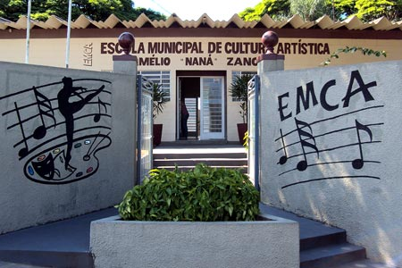 Escola Municipal de Cultura Artistica